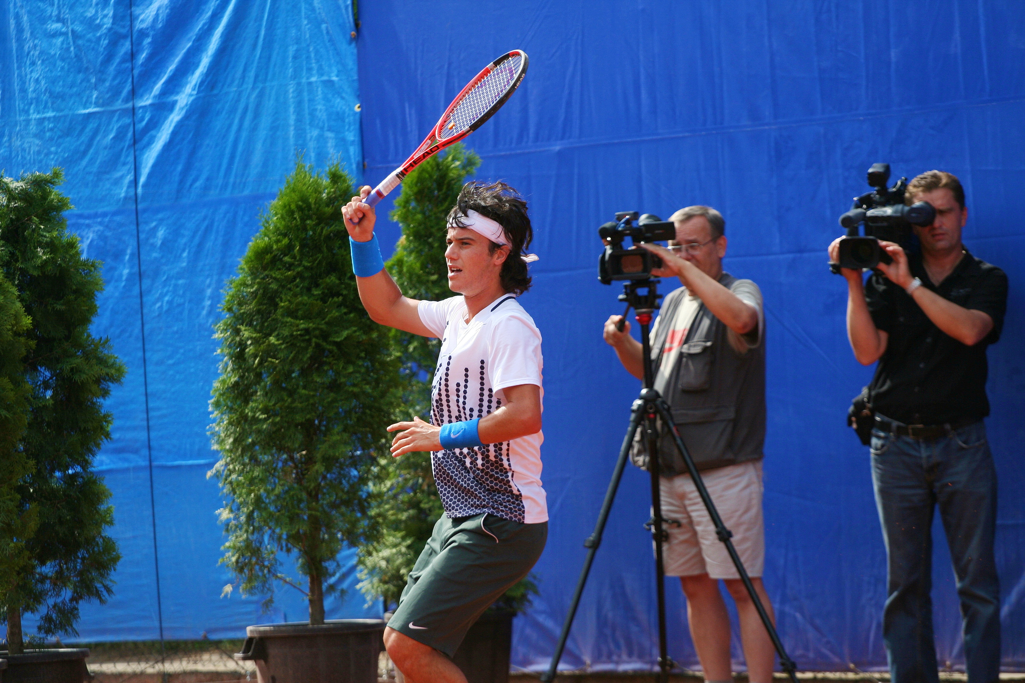 Javier Martí v 1. kole na Košice Open 2011